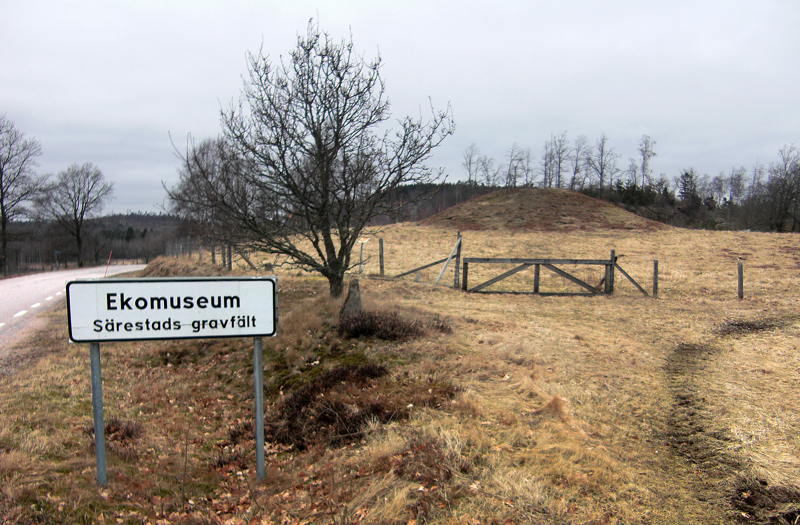 Hagbards kulle (Raä-nr Årstad 37:1) vid Särestads gravfält i Årstads socken, Årstads härad, Falkenbergs kommun, Halland, Hallands län, Sverige.